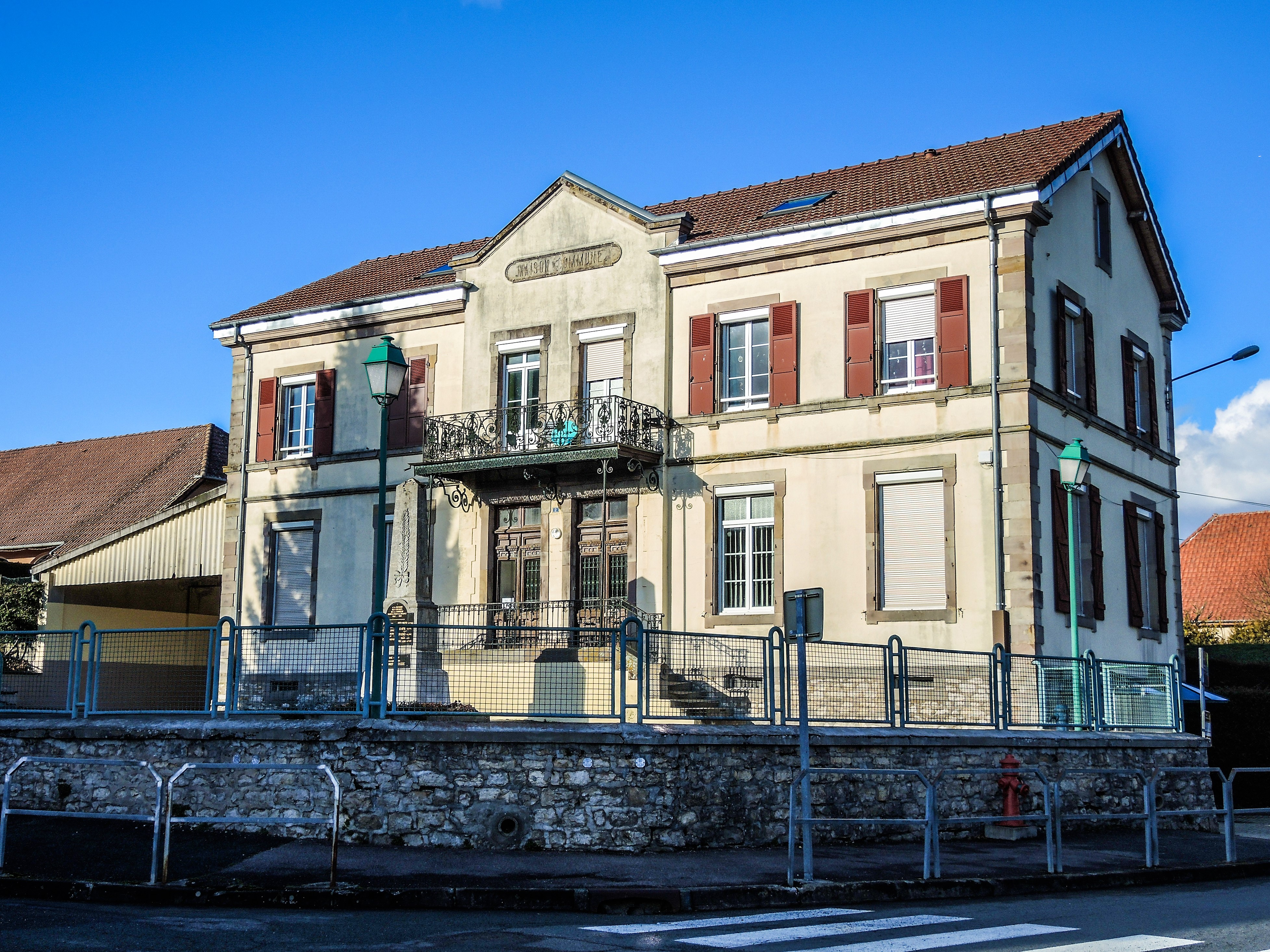 Mairie-école d'Angeot. Territoire de Belfort.